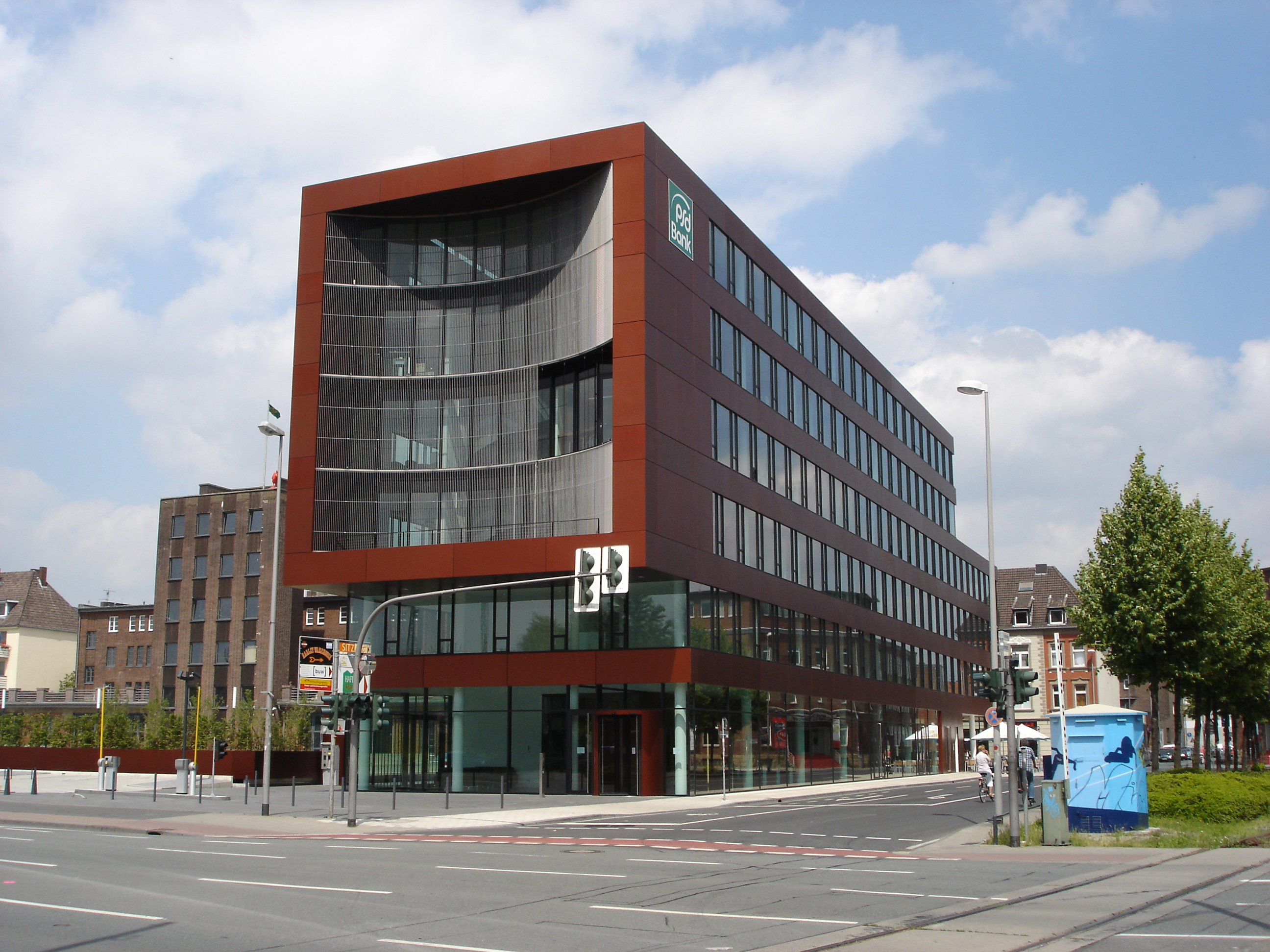 Neubau der PSD-Bank Westfalen-Lippe in Münster, Westfalen, Deutschland